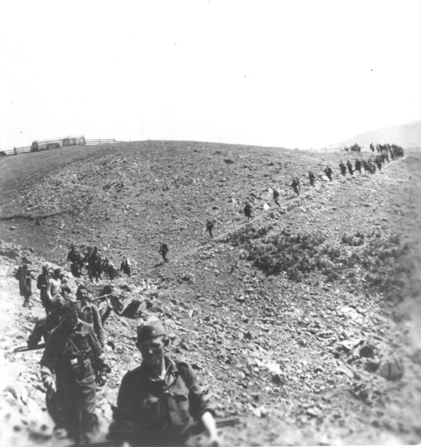 Srpskohrvatski / српскохрватски: Borci 1 zlatarskog bataljona 3. proleterske sandžačke brigade na maršu prema reci Uvcu, kod Štrbaca pored Priboja na Limu, avgusta 1944.